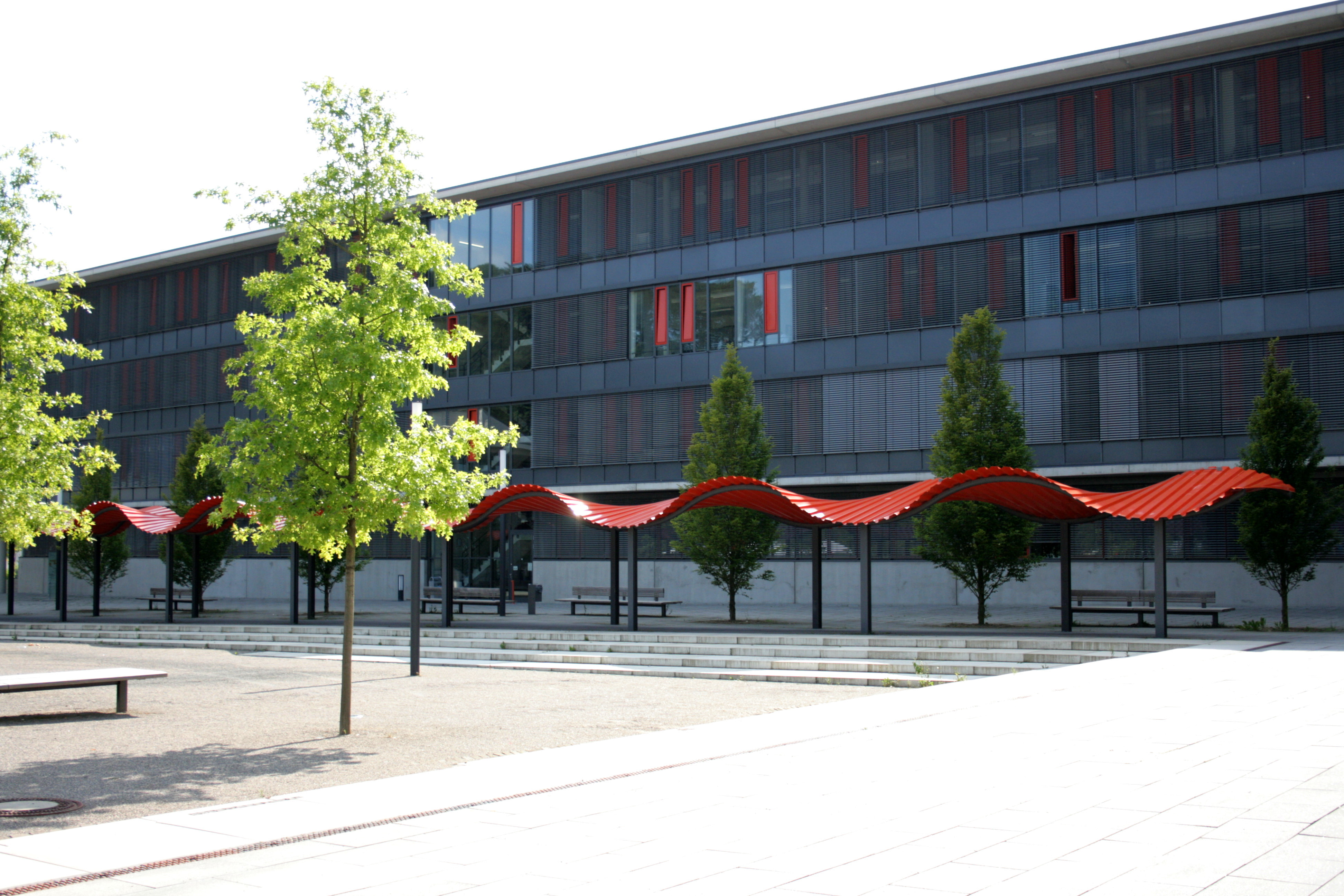 Fachhochschule Köln, Campus Gummersbach, Steinmüllerallee in Gummersbach